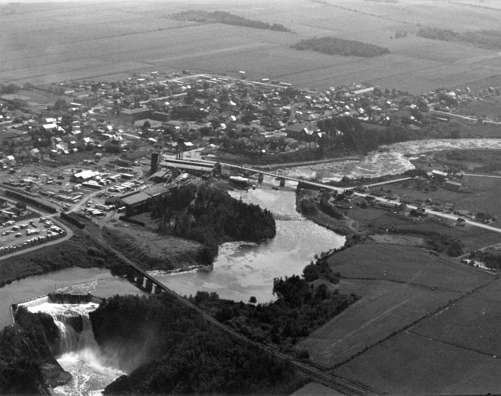 La rivière Mitis et ses chutes à Price « Cette vue aérienne montre le village de Price au sommet de sa prospérité. Le nom du village provient de la Price Brothers, un empire du bois présent sur les deux rives du fleuve Saint-Laurent, ainsi que vers le nord jusqu’à la région du Saguenay. La Price Brothers possédait également la Seigneurie du Lac Mitis, en amont de la rivière, où il y avait une vaste forêt d’épinettes. Elle utilisait la rivière pour transporter plus facilement les billots de bois jusqu’à l’usine située en aval dans le village. Elle occupait un grand terrain près de la rivière qui était divisé par la voie ferré du Canada and Gulf Terminal Railway. Cette photographie montre bien la proximité des chutes avec le village et leur hauteur qui en font un site naturel conçu pour la production d’hydroélectricité. En dehors du cadre de la photographie, il y a le pont du chemin de fer Intercolonial, qui est ,encore aujourd’hui, la linge principale du CN entre Montréal et Halifax. »